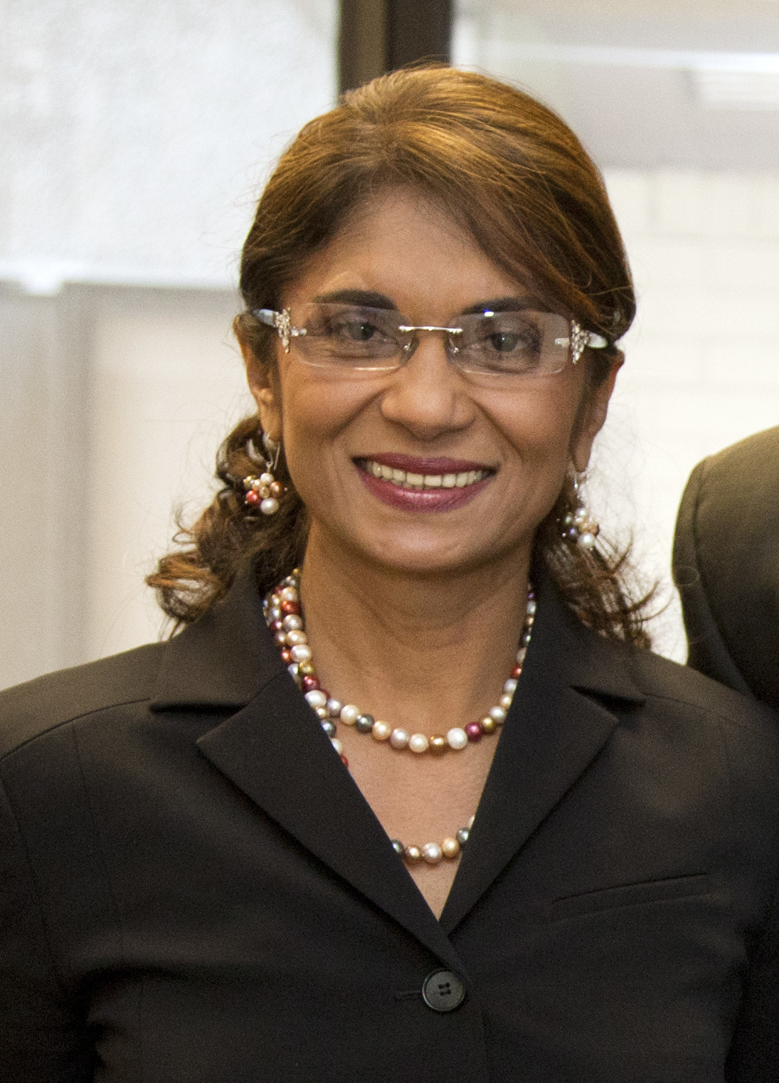 Washington D.C (EE.UU), 21 de marzo. El Canciller Ricardo Patiño se reunió con la Representante Permanente de Surinam ante la Organización de Estados Americanos (OEA), Embajadora Niermala Hindori-Badrising. Acompañó además la Representante Permanente del Ecuador ante la OEA, Embajadora María Isabel Salvador. Foto: Fernanda LeMarie - Cancillería del Ecuador.